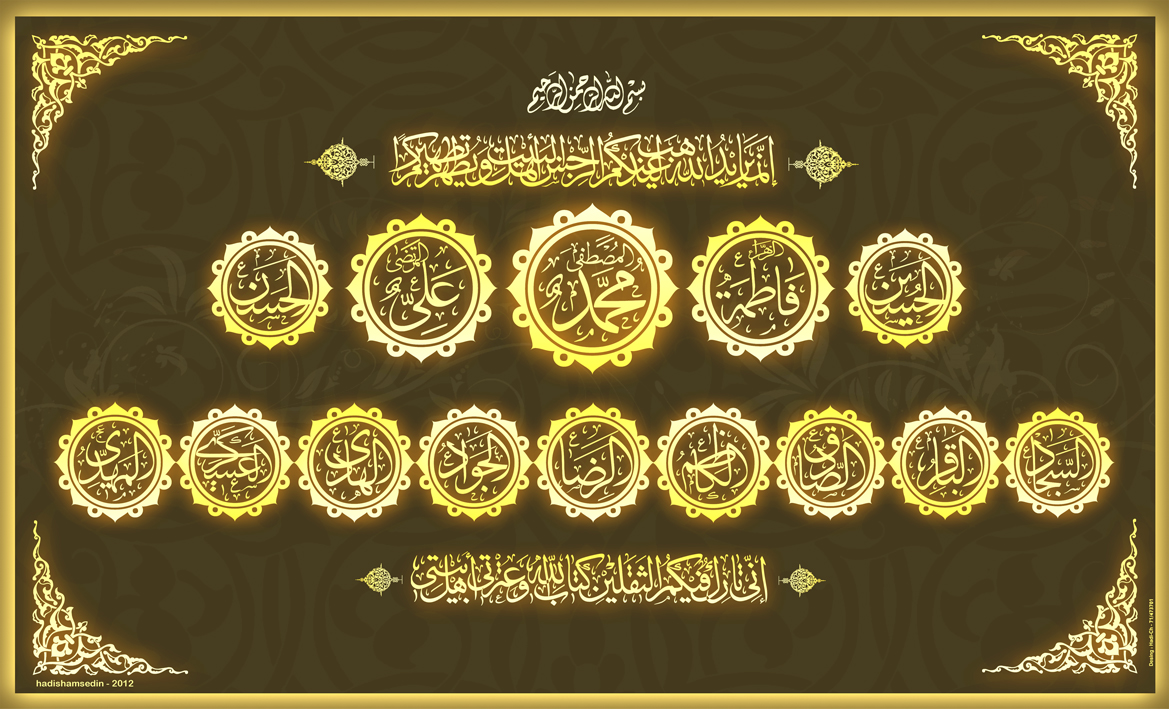 Le verset de la purification